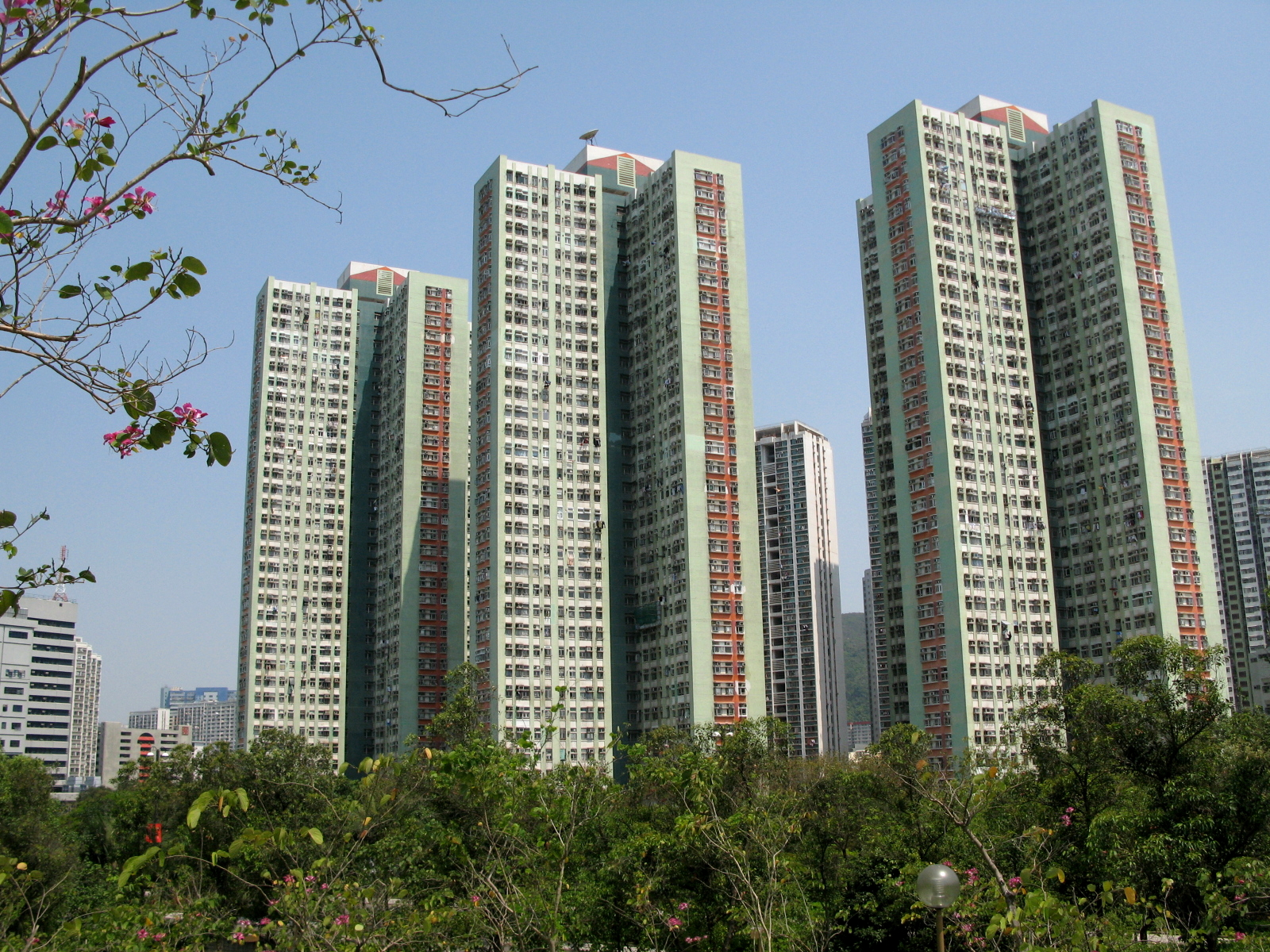 Ming Nga Court 明雅苑